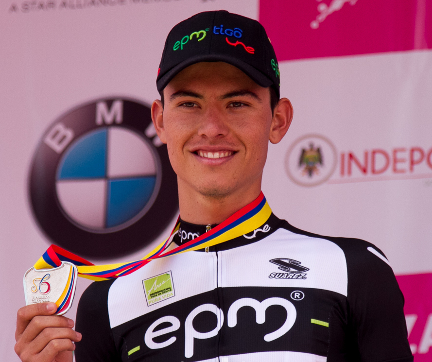 Eduardo Estrada avec sa médaille d'argent dans la main, obtenue au championnat de Colombie Espoir 2016 du contre-la-montre.